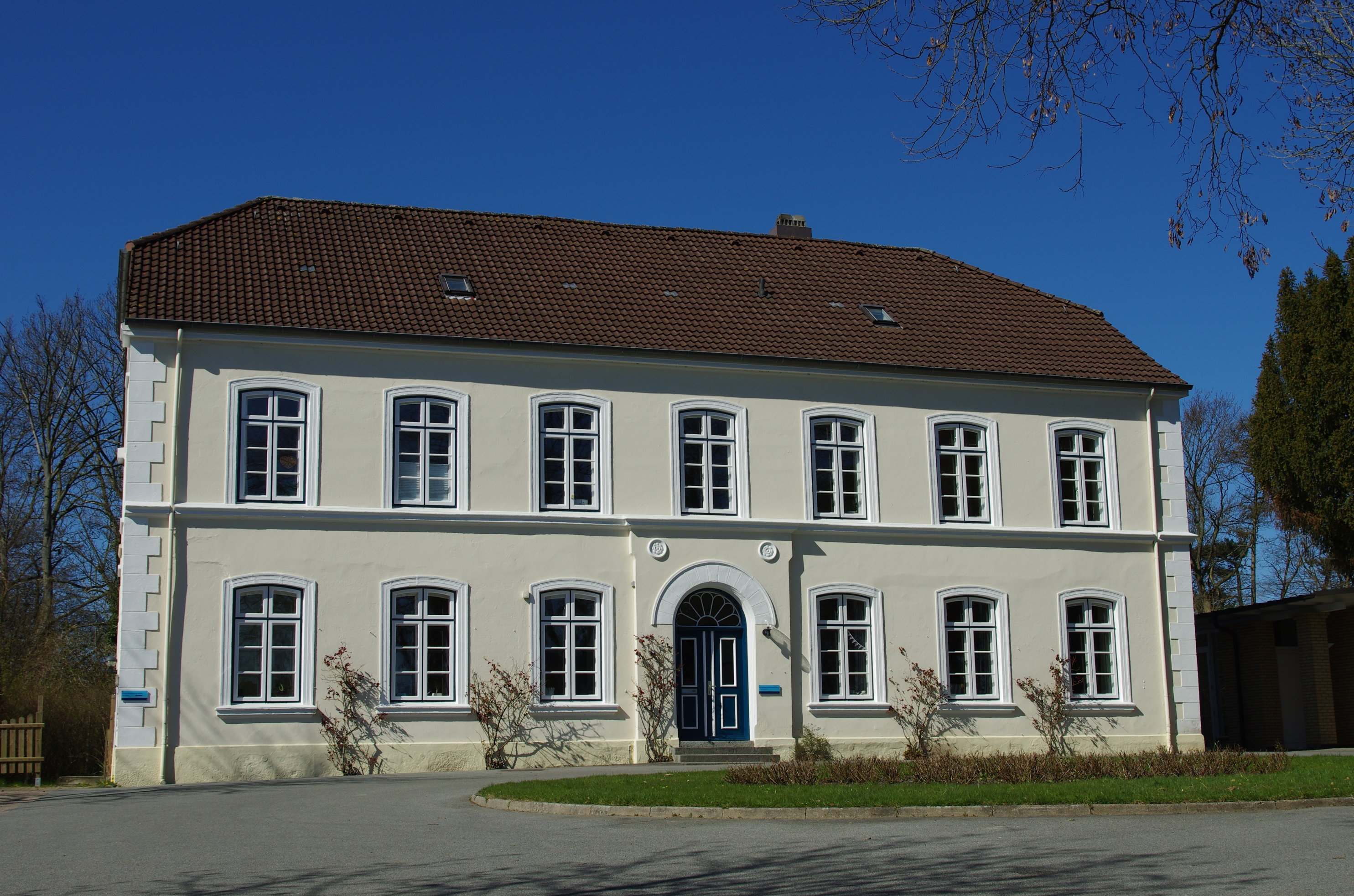 Kappeln In Schleswig-Holstein. Das Haus Wassermühlenstraße 12 ist denkmalgeschützt.